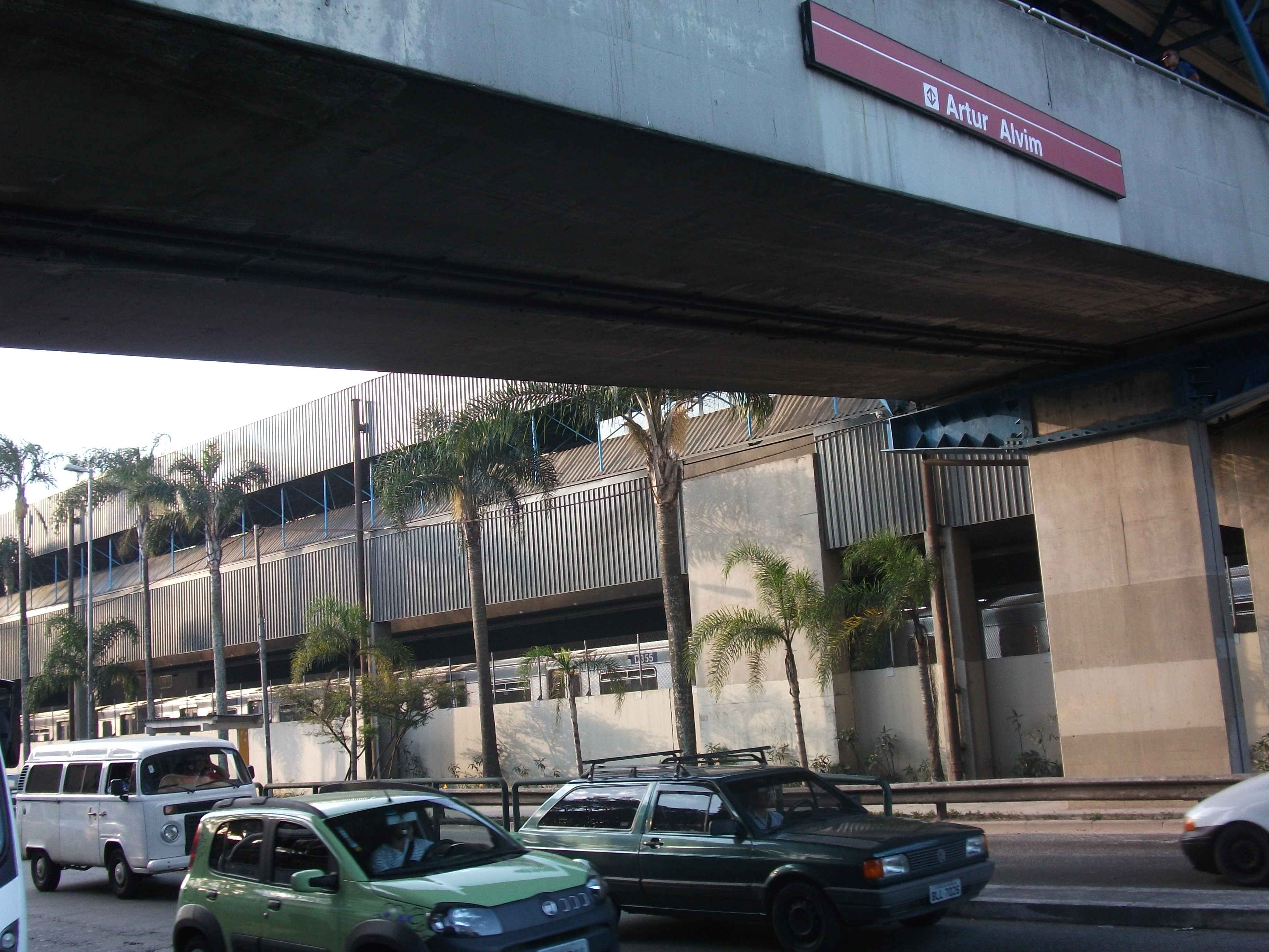 Estação Artur Alvim do metrô vista da Radial Leste.